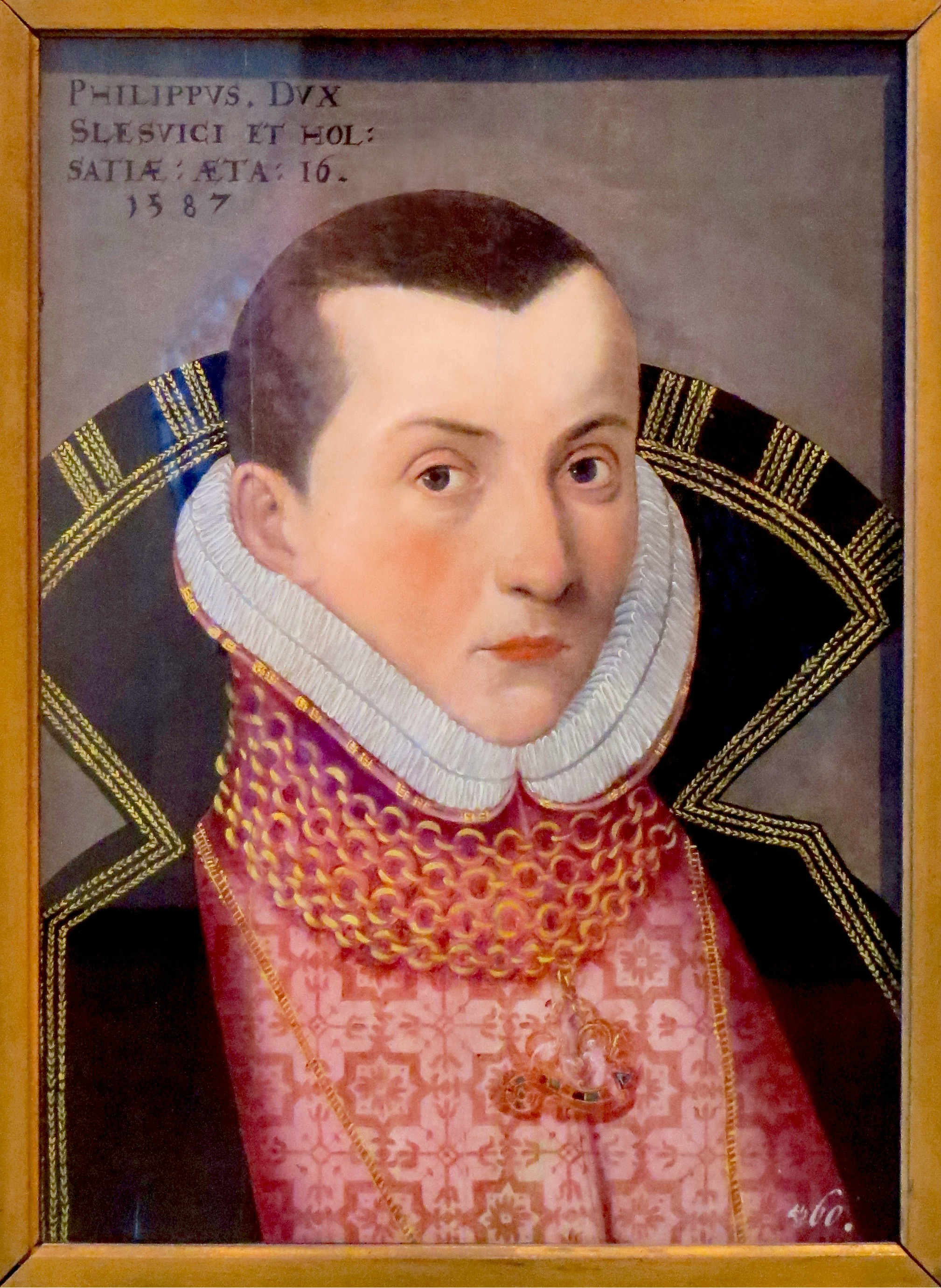 Philip af Slesvig-Holsten-Gottorp (1570–1590), Jacob von Voordt, Gottorp Slot, Sydslesvig